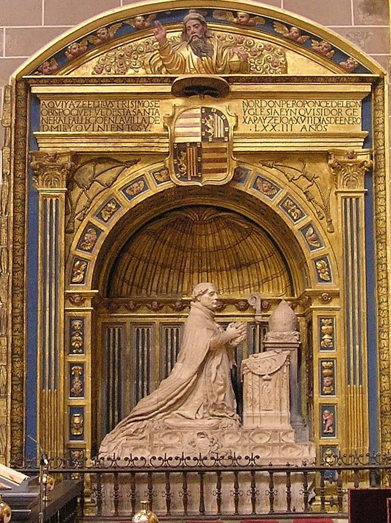 Sepulcro del Obispo Pedro Ponce de León en la Catedral de Plasencia (provincia de Cáceres)